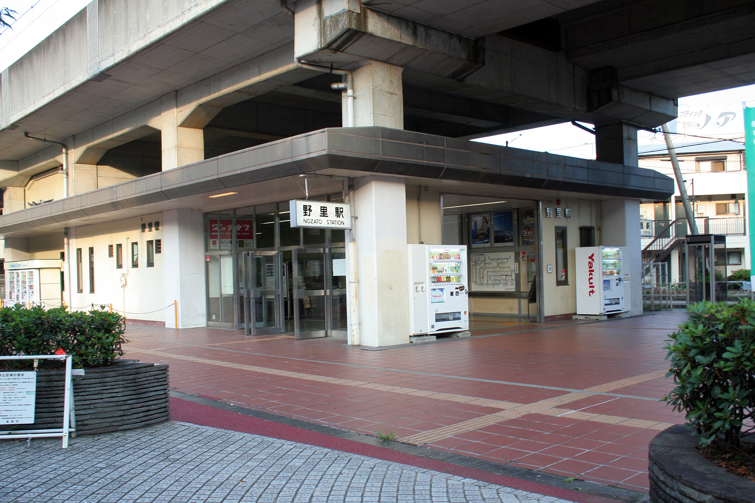 野里駅。播但線の鉄道駅。 南西から見た野里駅の出入り口。